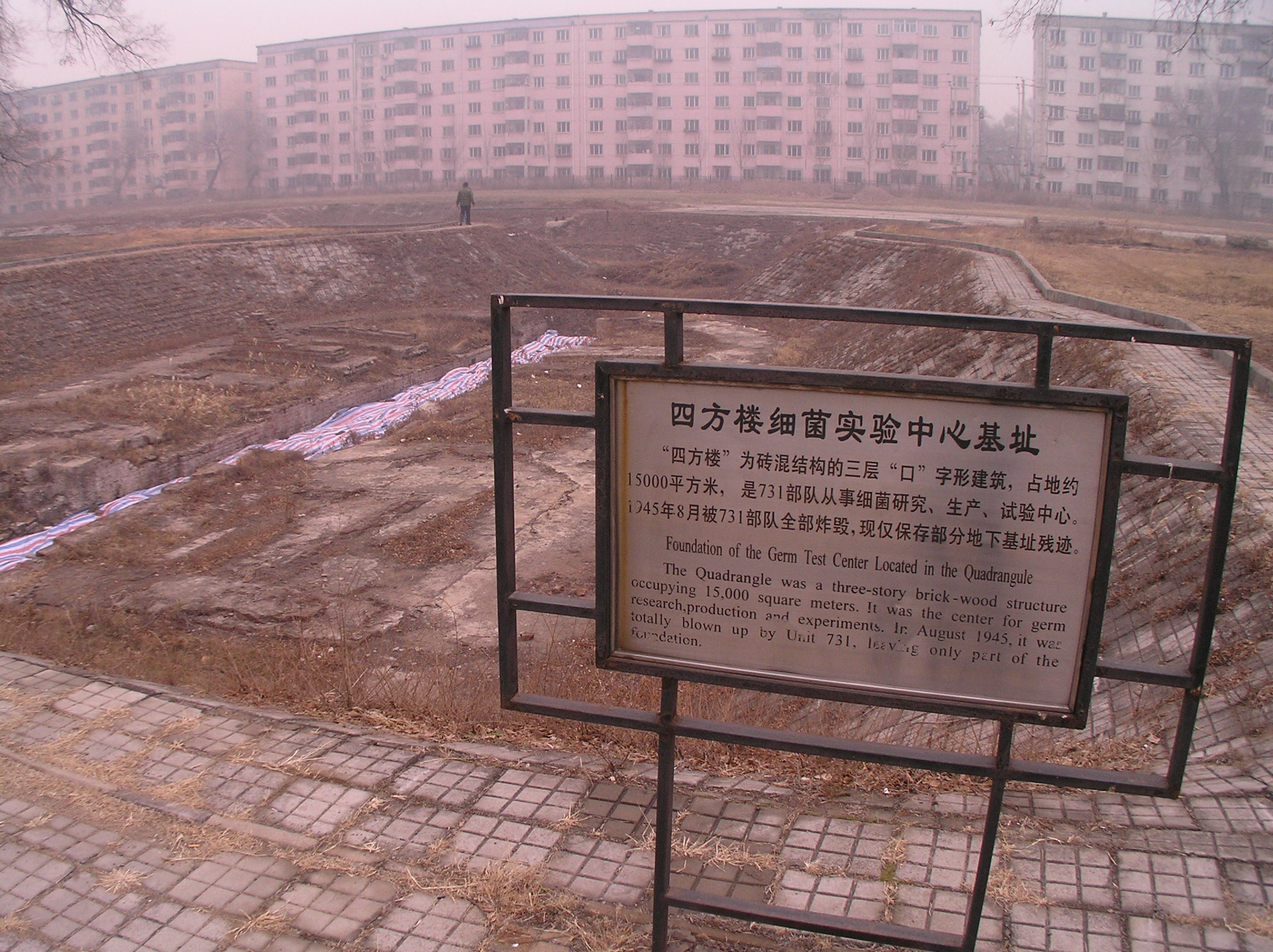 Building on the site of the Harbin bioweapon facility of Unit 731 関東軍防疫給水部本部731部隊（石井部隊） 日軍第731部隊旧址